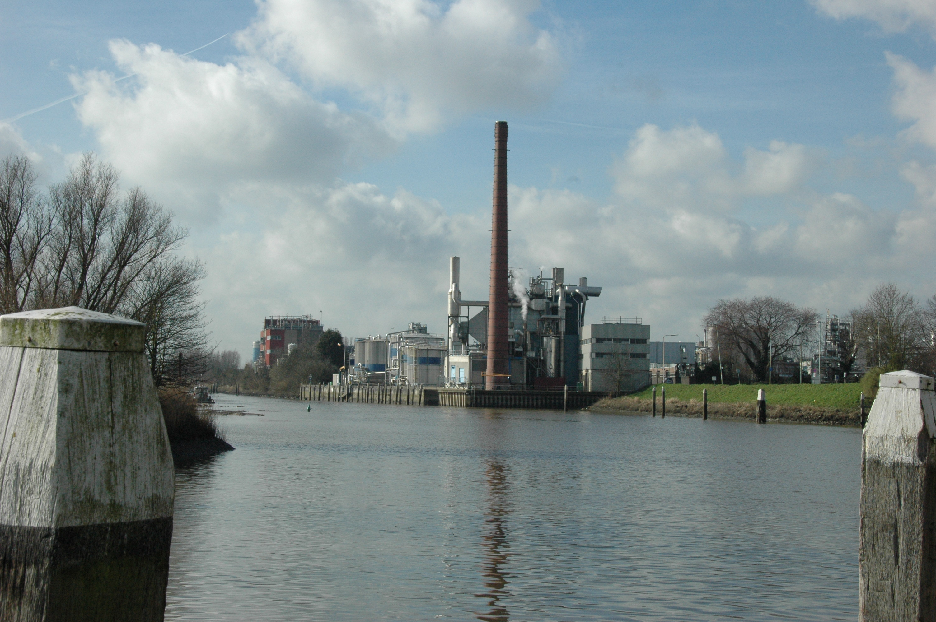 Schoorsteen van de voormalige Stearine kaarsenfabriek Gouda. Nu Chemische fabriek van Croda international te Gouda